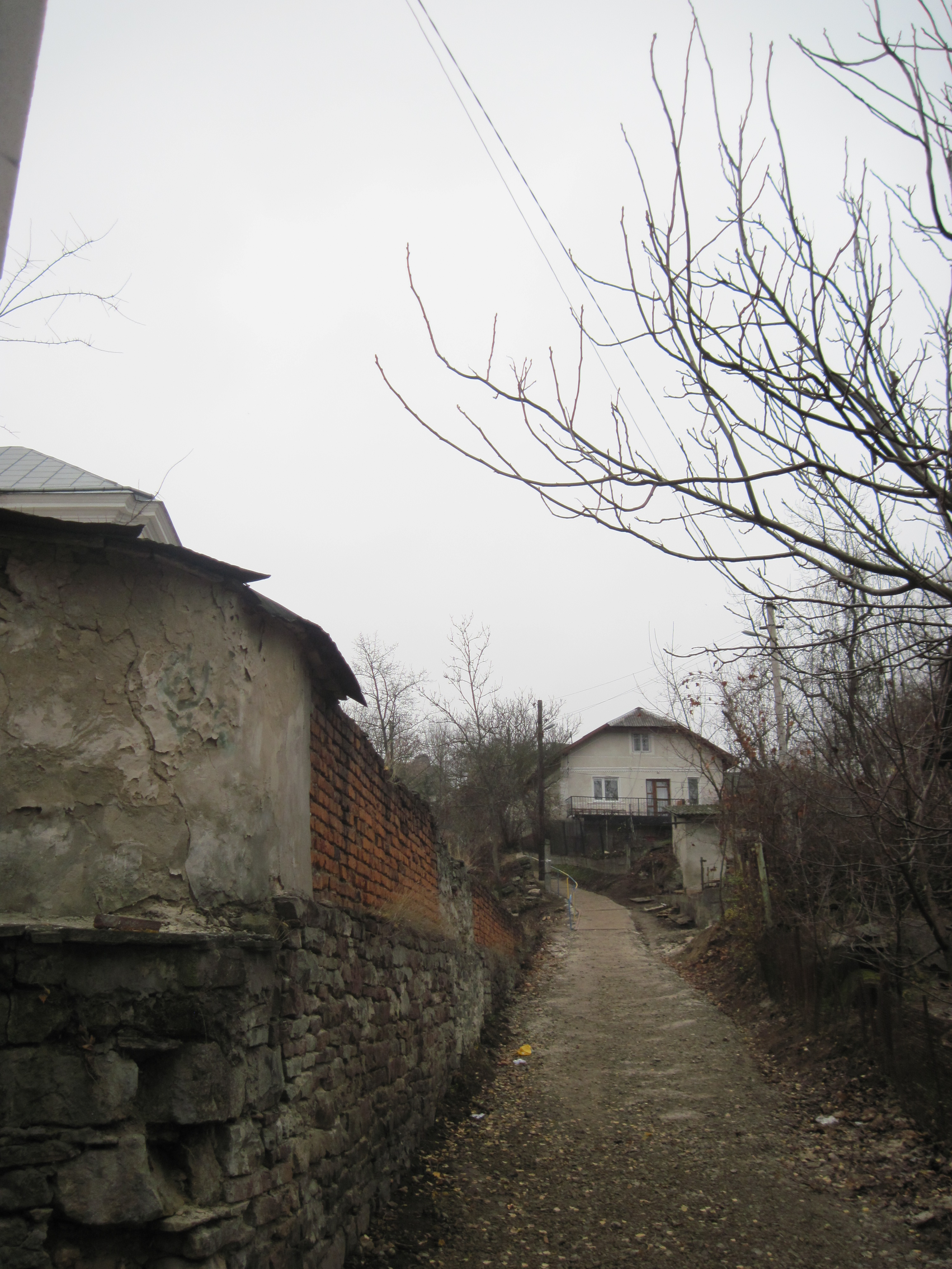 ремонт доріжки від костелу до замку Бучач осінь 2014